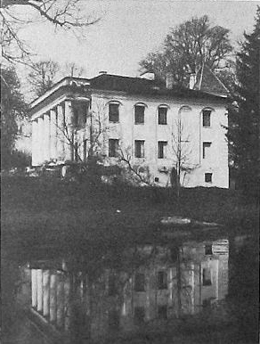 Беларуская (тарашкевіца): Дубровіца (Dubrovica), Варобін (Varobin). Сядзіба Плятэраў (Plater)